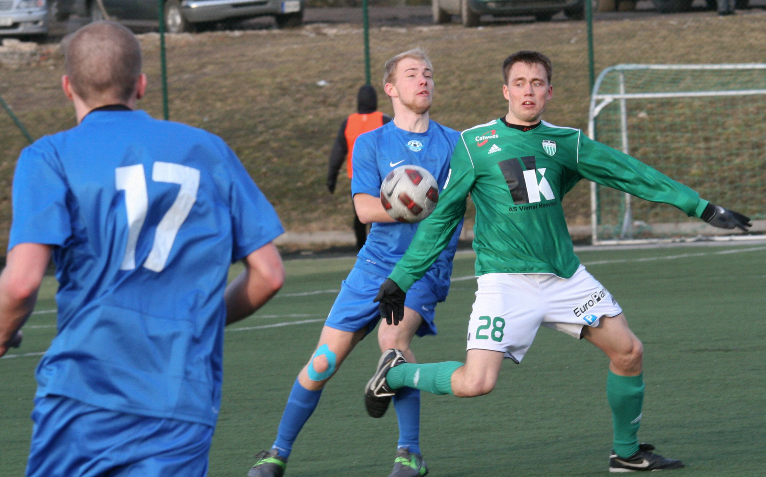 Narva Trans (punases)Tallinna Levadia